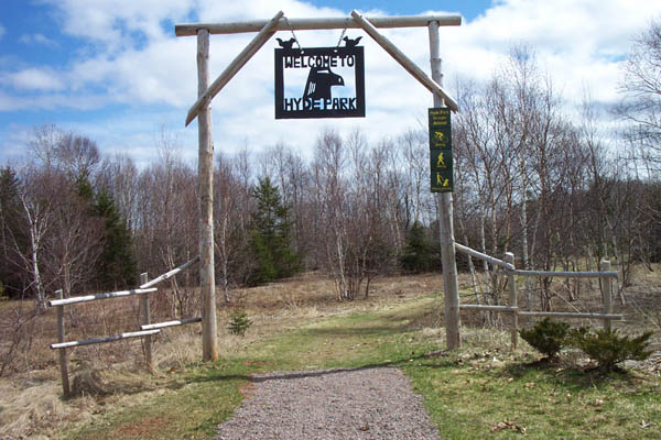 April 2002.